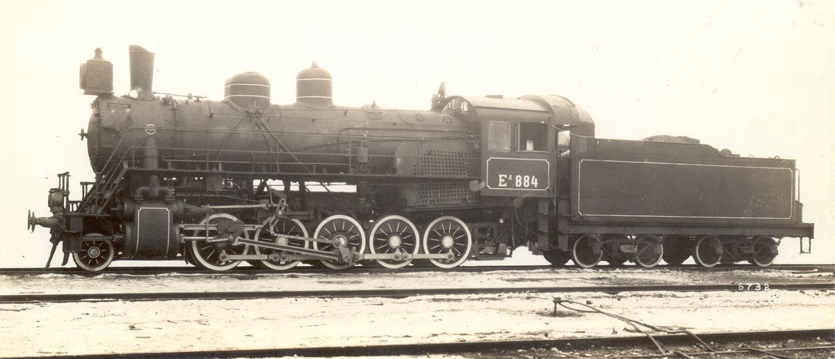 Паровоз Ел-884